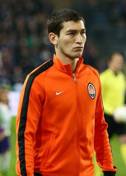 Тарас Степаненко - футболіст Шахтаря (Донецьк)